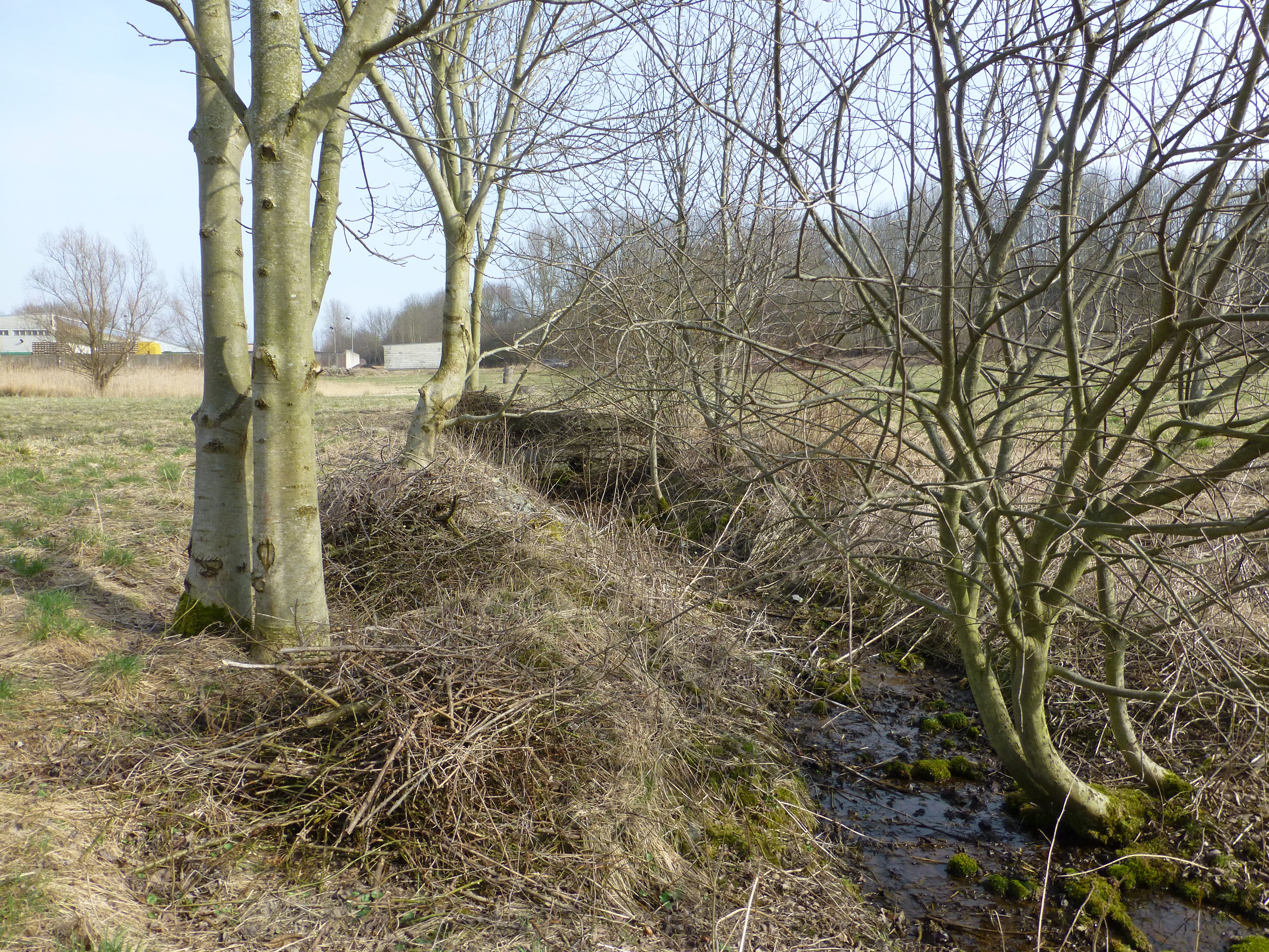 Hahlequelle in Worbis